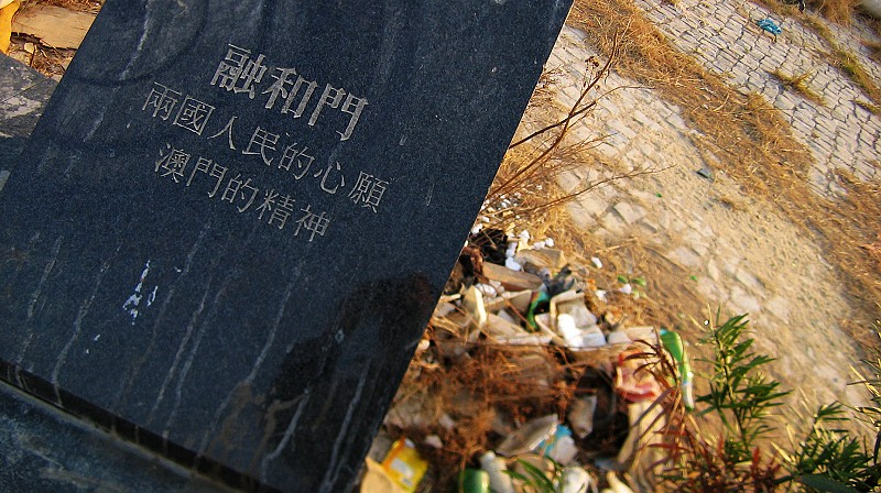 澳門融和門